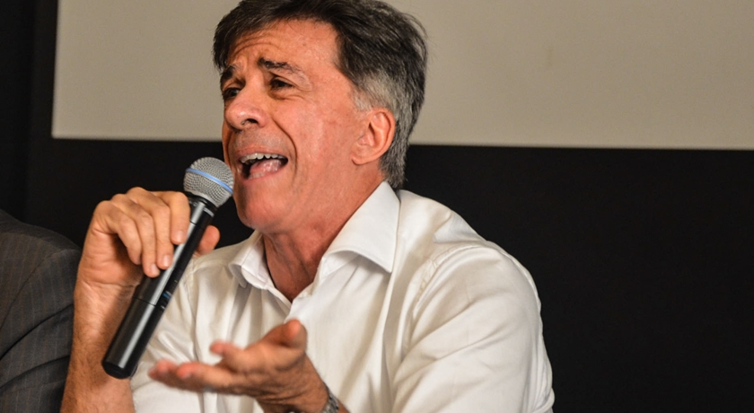 Guerreiro em palestra